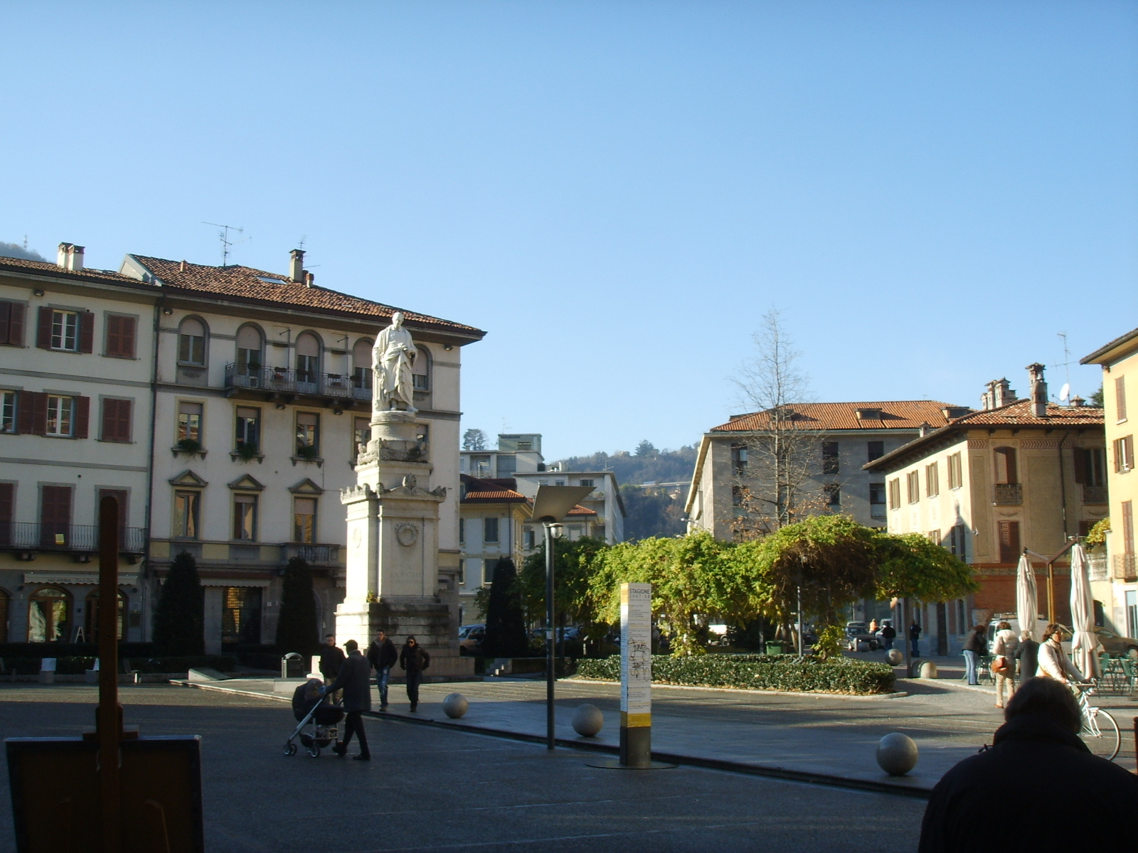 Monumento ad Alessandro Volta in piazza Volta a Como.